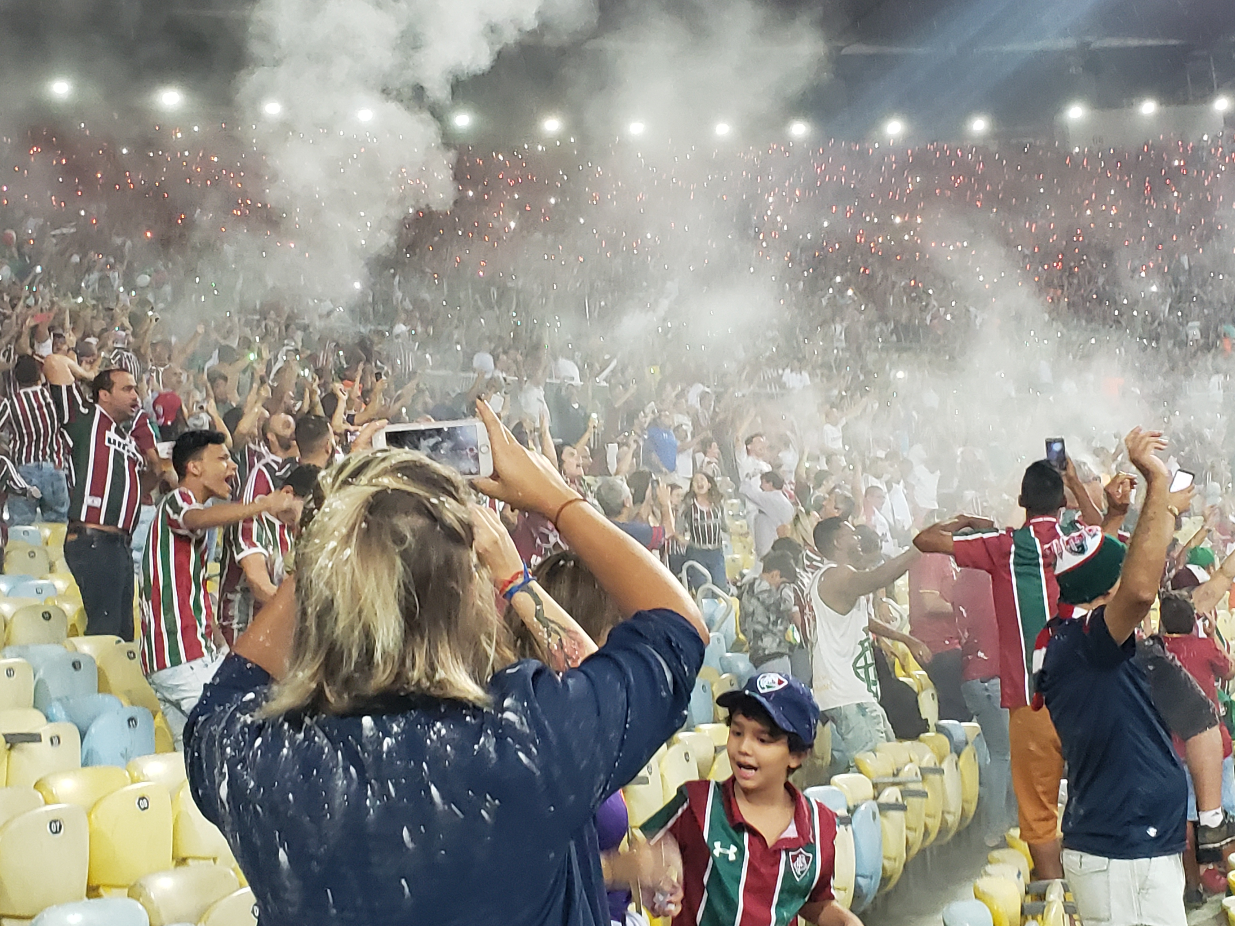 Torcida do Fluminense Football Club contra o Corinthians na Copa Sul-Americana de 2019, partida disputada no Maracanã em 29/08/2019 e que terminou empatada por 1 a 1.